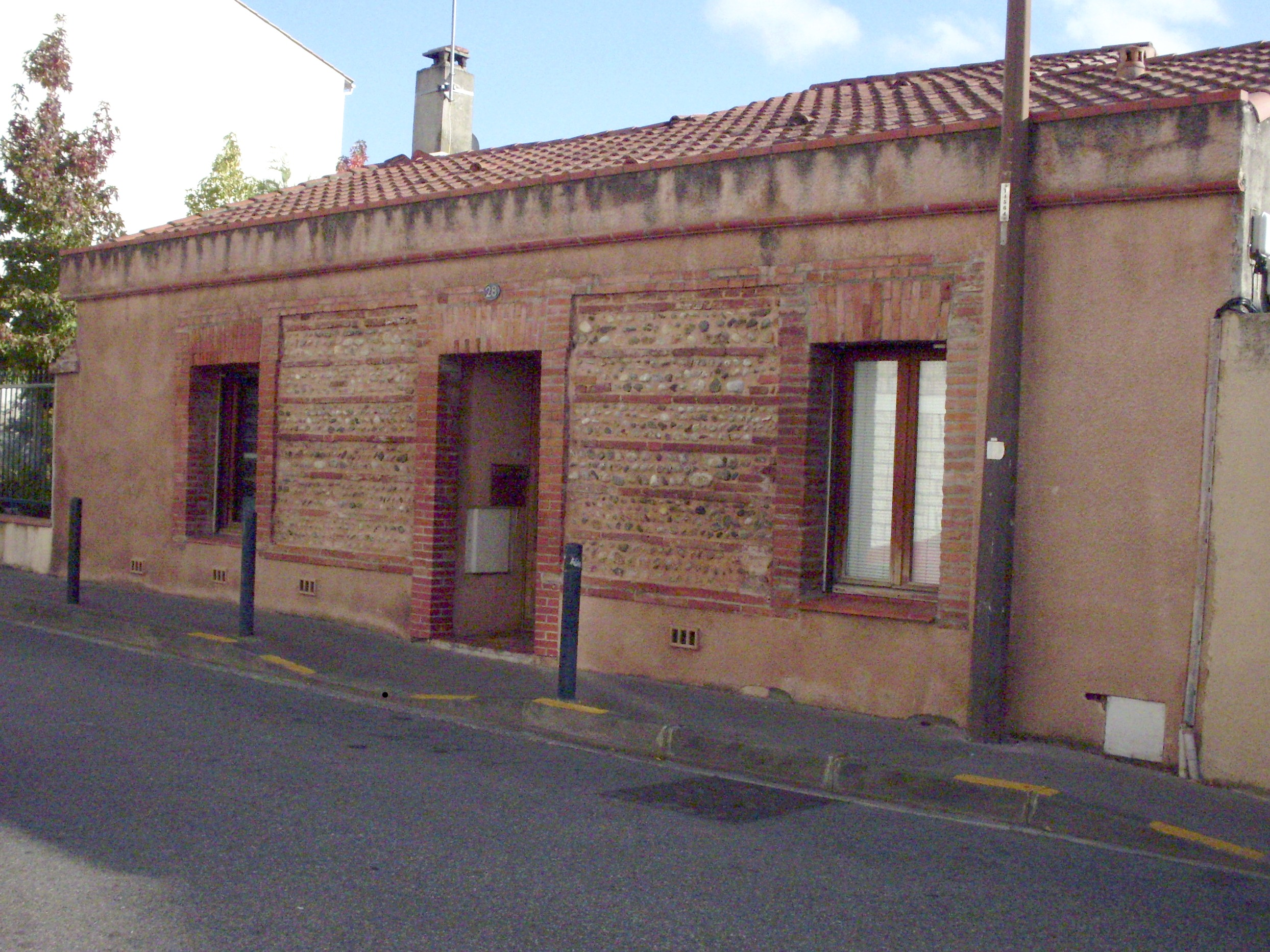 Toulousaine, quartier des Minimes, Toulouse.